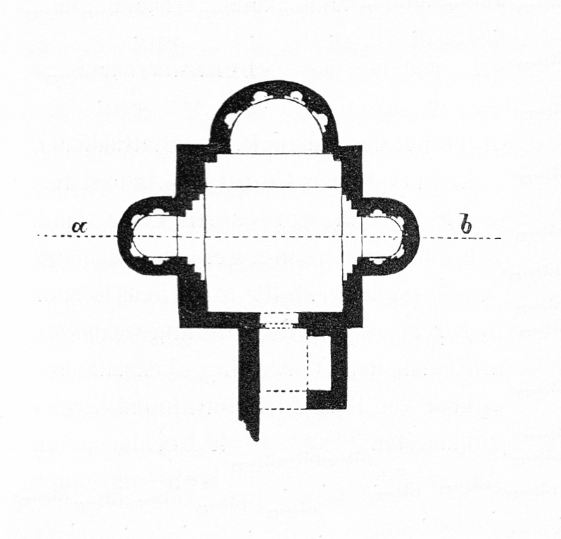 Bilder aus dem in derselben Kategorie befindlichen Artikel aus den Mittheilungen der kaiserl. königl. Central-Commission zur Erforschung und Erhaltung der Baudenkmale Band 1, 1856.